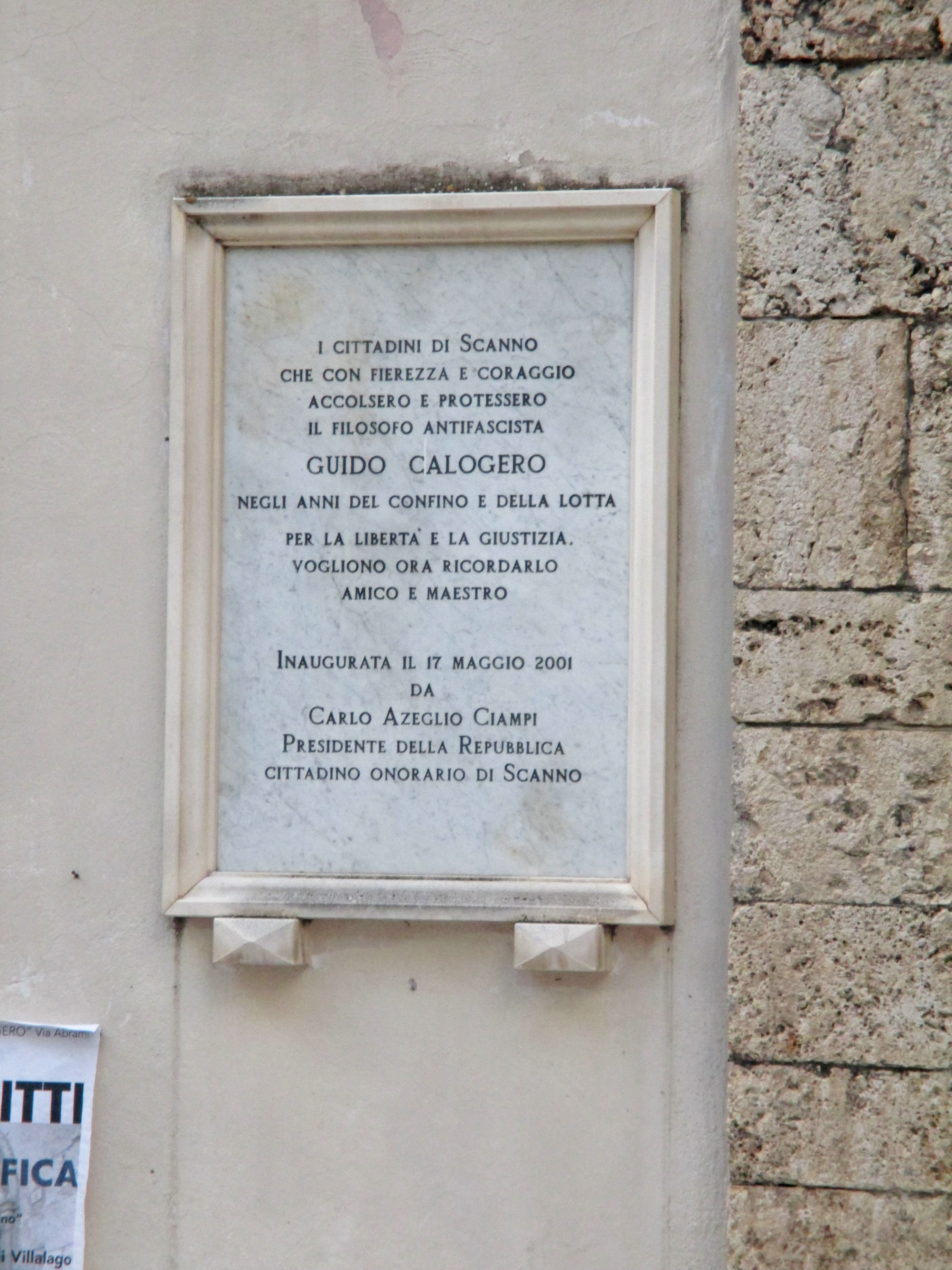 Targa ricordo in Scanno